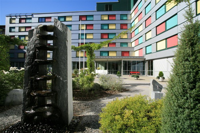 Innenhof des ISH